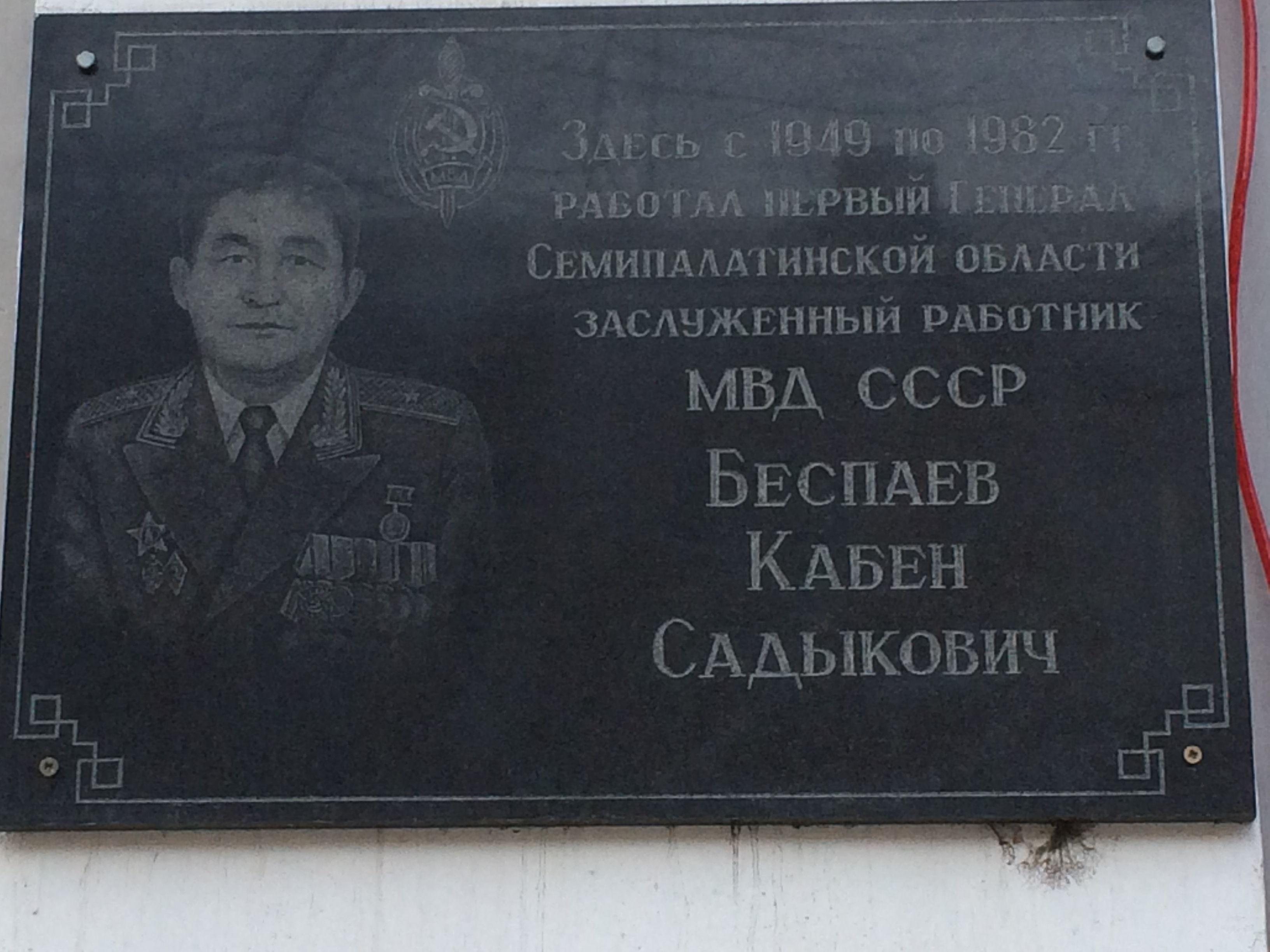 Мемориальная фотография по улице Генерала Беспаева